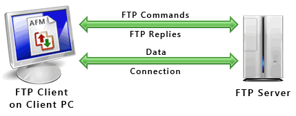 Монгол: Ftp-protocol